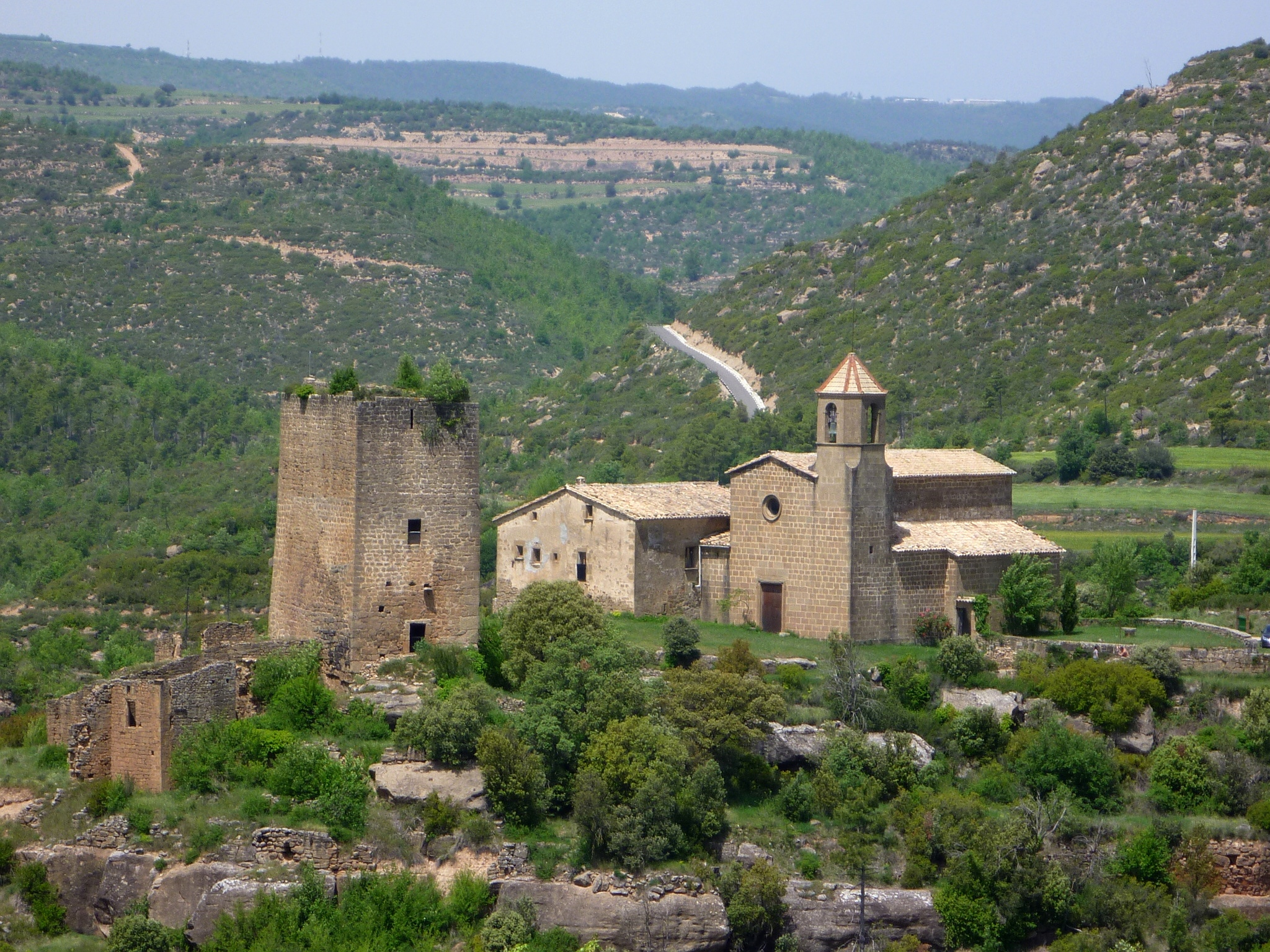 Conjunt del Castell i Sant Martí de Riner, vist des de prop de la masia Casamartina